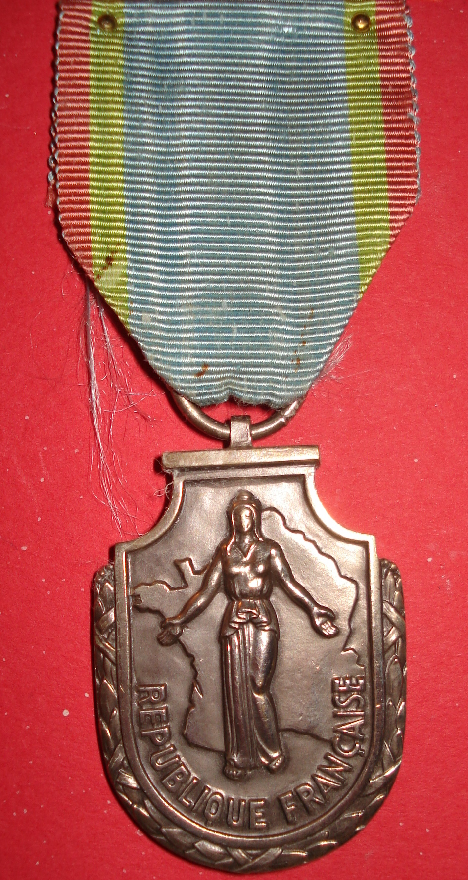 Plaque métallique formant un écusson. Une guirlande de feuille entoure sa partie principale.L'avers porte une République en pied, bras écartés sur fond de carte de France et REPUBLIQUE FRANCAISE. Au revers, MERITE TOURISTIQUE. Ruban bleu ciel bordé de 2 raies verticales verte et rouge sur les bords.